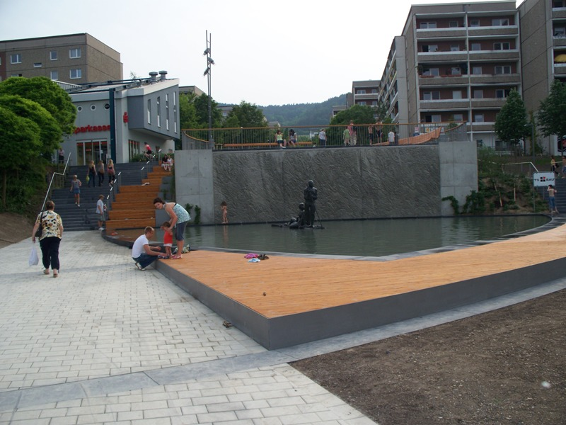 Brunnen in Winzerla nach Umgestaltung 2008